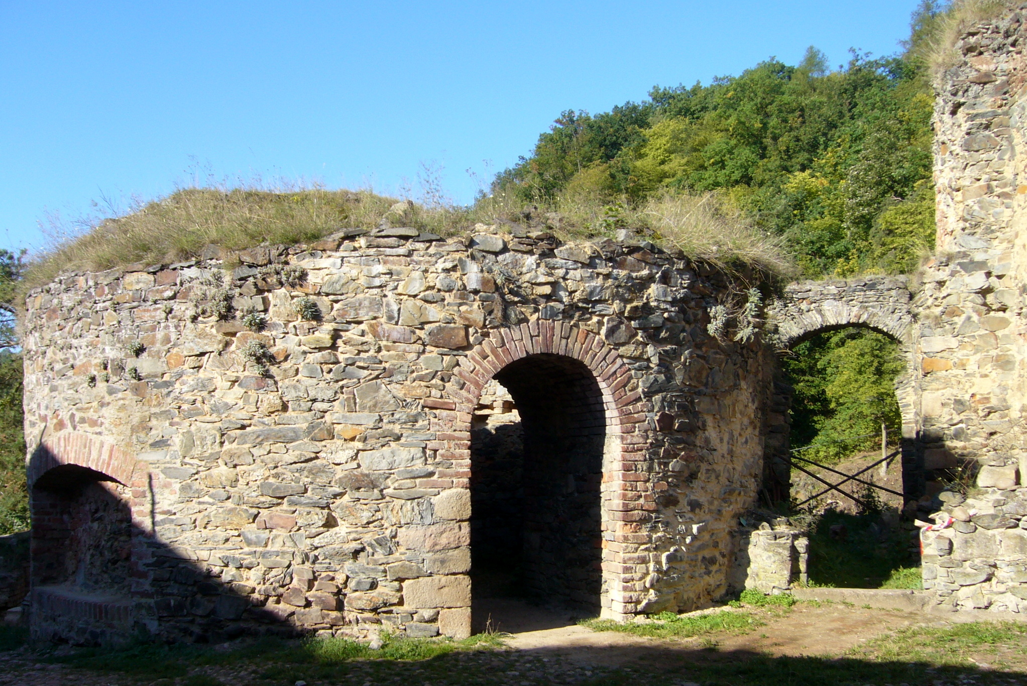 Bergfrit, Hrad Krašov, nade Mží, Bohy.